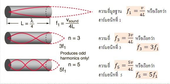 การเกิดการสั่นพ้องอขงเสียงในหลอดปลายปิด